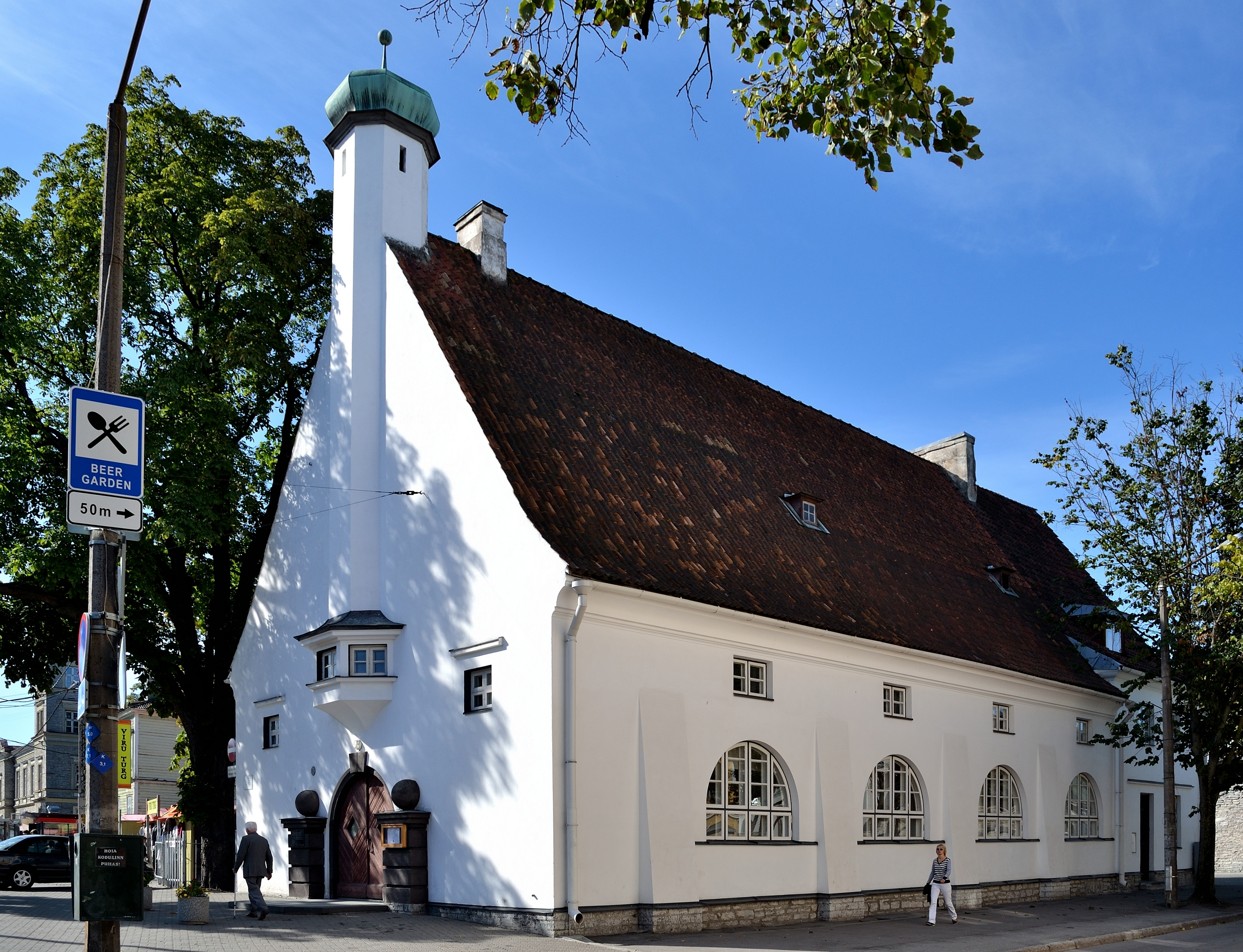 Tallinna Seitsmenda päeva adventistide palvela